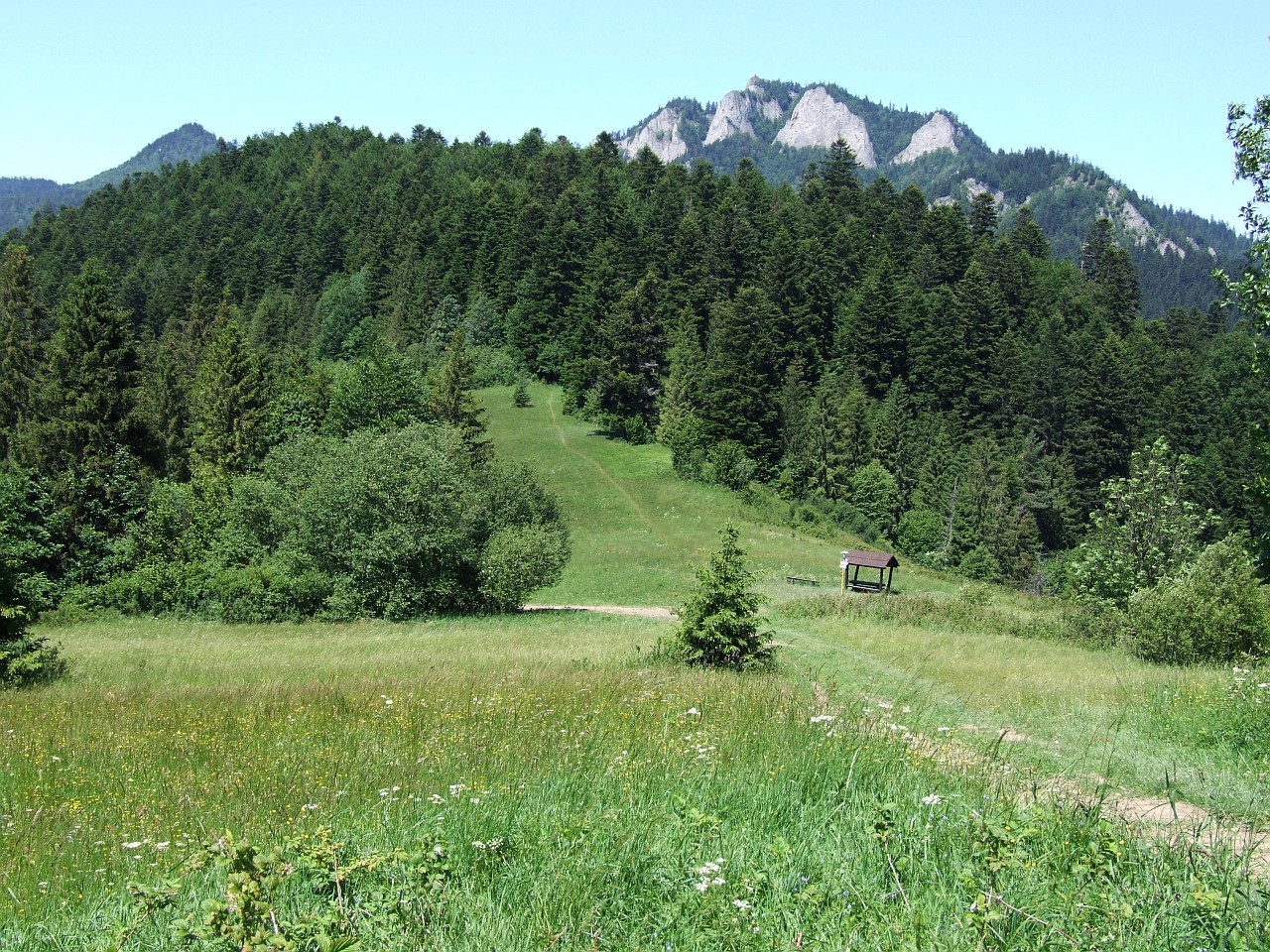 Przełęcz pod Klasztorną Górą i Klasztorna Góra. W głębi Trzy Korony